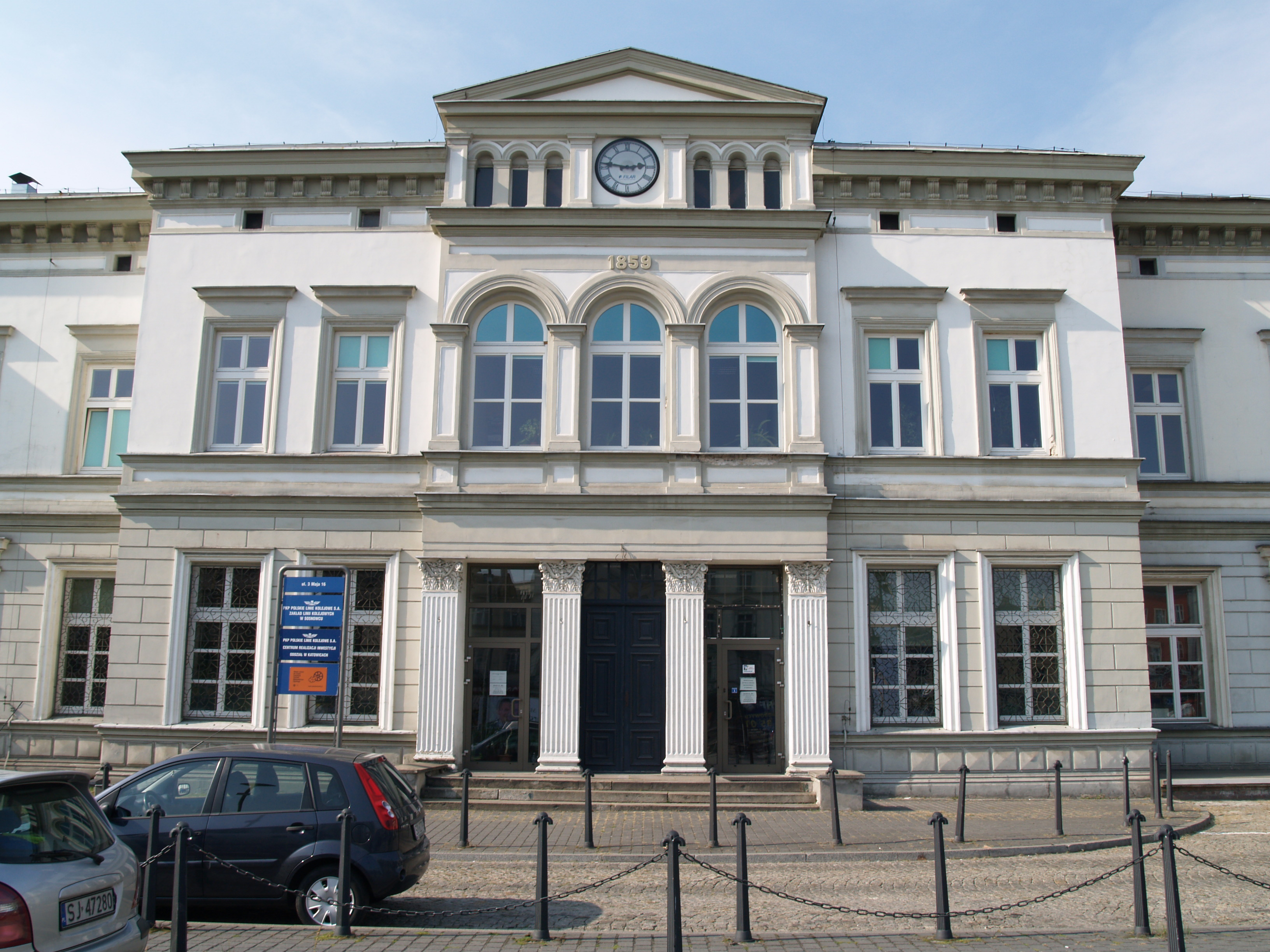 Sosnowiec. Dworzec Główny PKP. Dawne wejście główne, obecnie część biurowa.